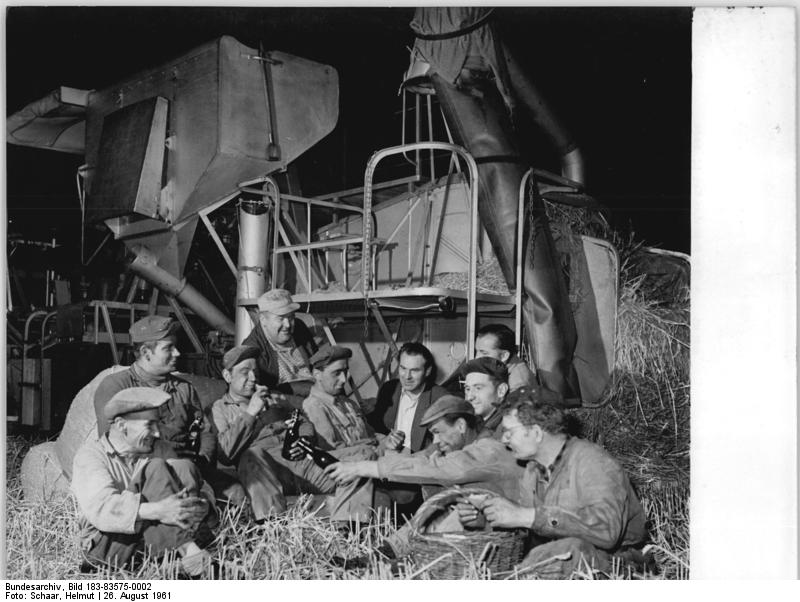 Pause während einer Nachternte Zentralbild Schaar 26.8.1961 Mähdrescher der MTS Grimma im Nachteinsatz Jede Stunde guten Wetters wird in der MTS Grimma ( Bezirk Leipzig) genutzt, um schnellstens die Ernte verlustlos zu bergen. Auch in den Nachtstunden rollen die Mähdrescher und Strohpressen über die Felder, denn bis zum 28.8.1961 soll die Getreidemahd im ganzen Kreisgebiet abgeschlossen sein. Im MTS-Bereich Grimma sind von den 4430 ha Getreidefläche 4030 ha gemäht. UBz: Mähdrescherbesatzung der MTS Grimma auf einem Weizenschlag der LPG Bröhsen bei einer nächtlichen Verschnaufpause.